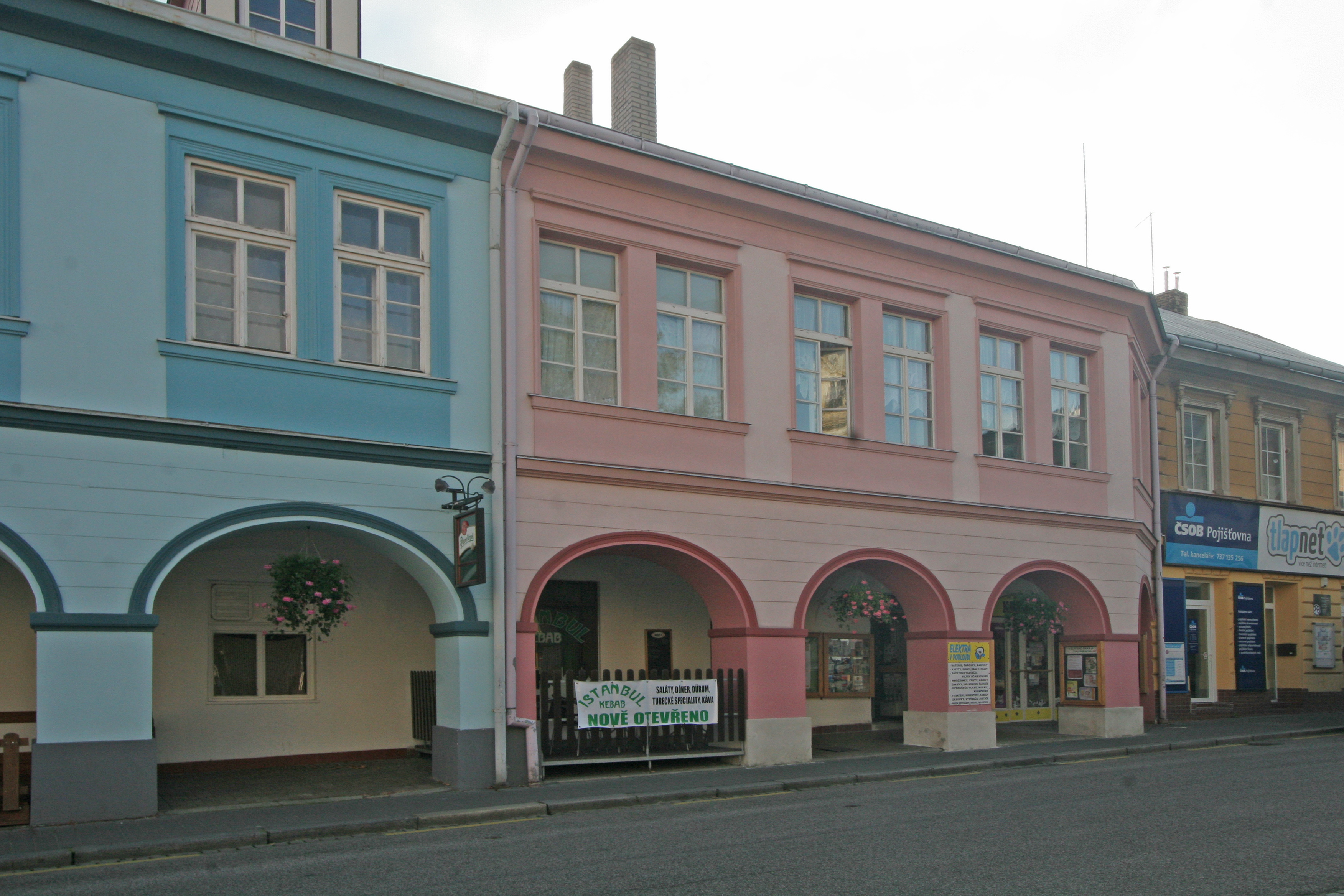 Měšťanský dům (Přelouč), Masarykovo nám. 23, Přelouč